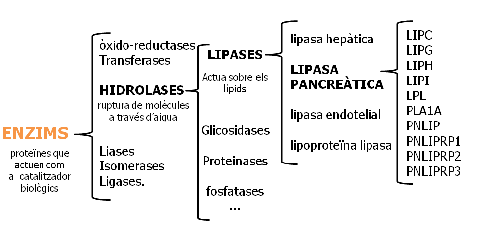 ClassLipasesPNLIPRP2